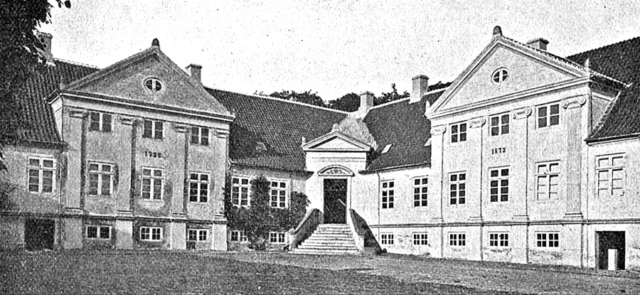 Broløkke er en lille hovedgård som nævnes i 1526 og kaldt Brobjerg. Navnet Broløkke er fra 1650. Gården var hovedsædet i det nu ophævede stamhus Ahlefeldt og ligger i Magleby Sogn, Langelands Sønder Herred, Sydlangeland Kommune. Hovedbygningen er opført i 1758 og tilbygget i 1873.